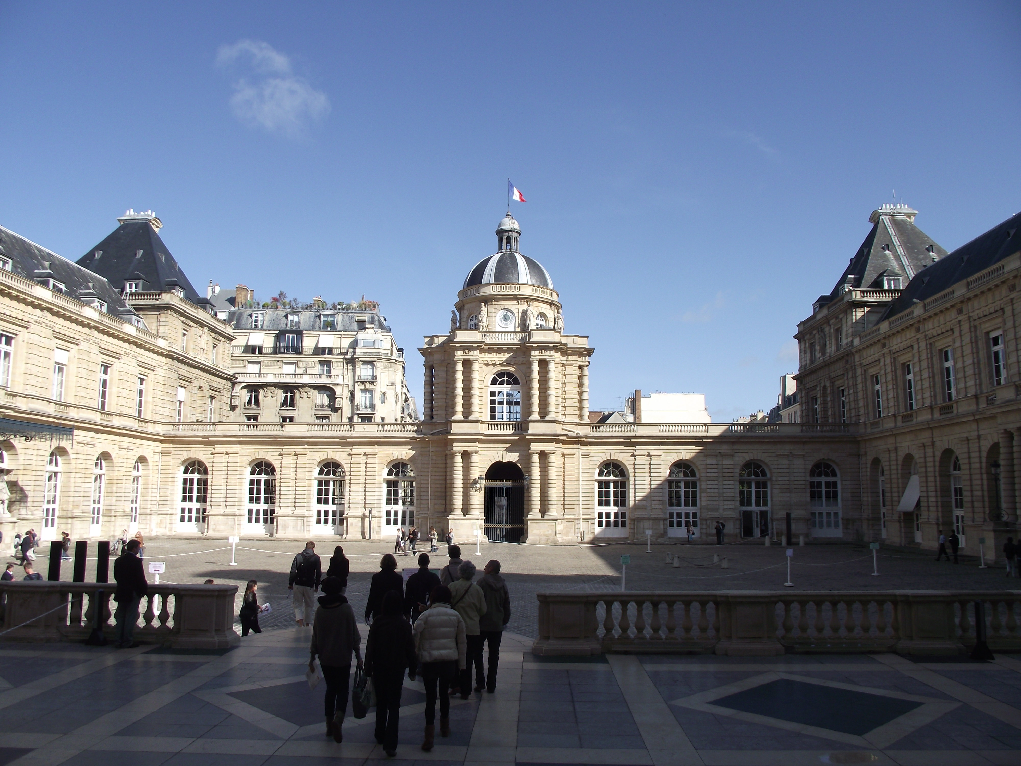 Paris, palais du Luxembourg, La court d'honneur